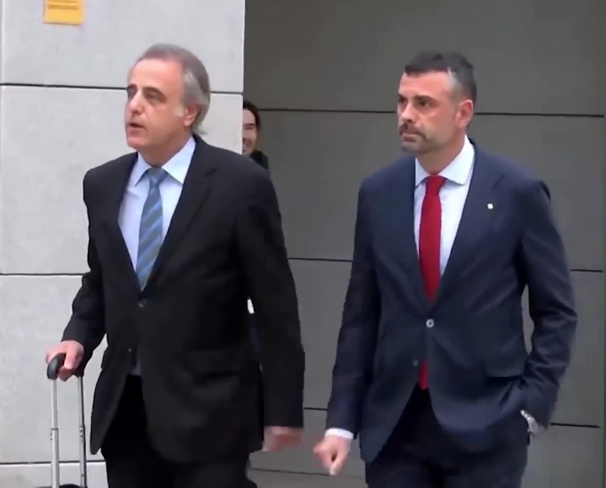 La jueza de la Audiencia Nacional Carmen Lamela ha acordado enviar a prisión sin fianza a Oriol Junqueras y a otros siete consellers que han comparecido este jueves, acusados de rebelión, sedición y malversación de fondos públicos.